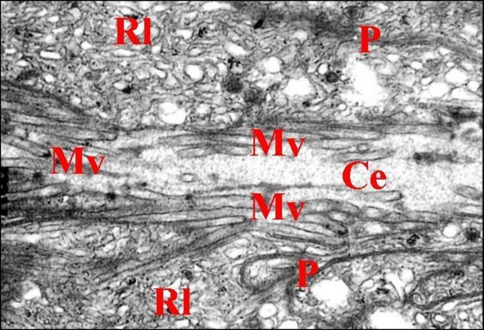 Languettes et microvilli apicales des cellules glandulaires dans la chambre d'une glande rostrale d' Argyrodes en coupe longitudinale, vues au microscope électronique à transmission.